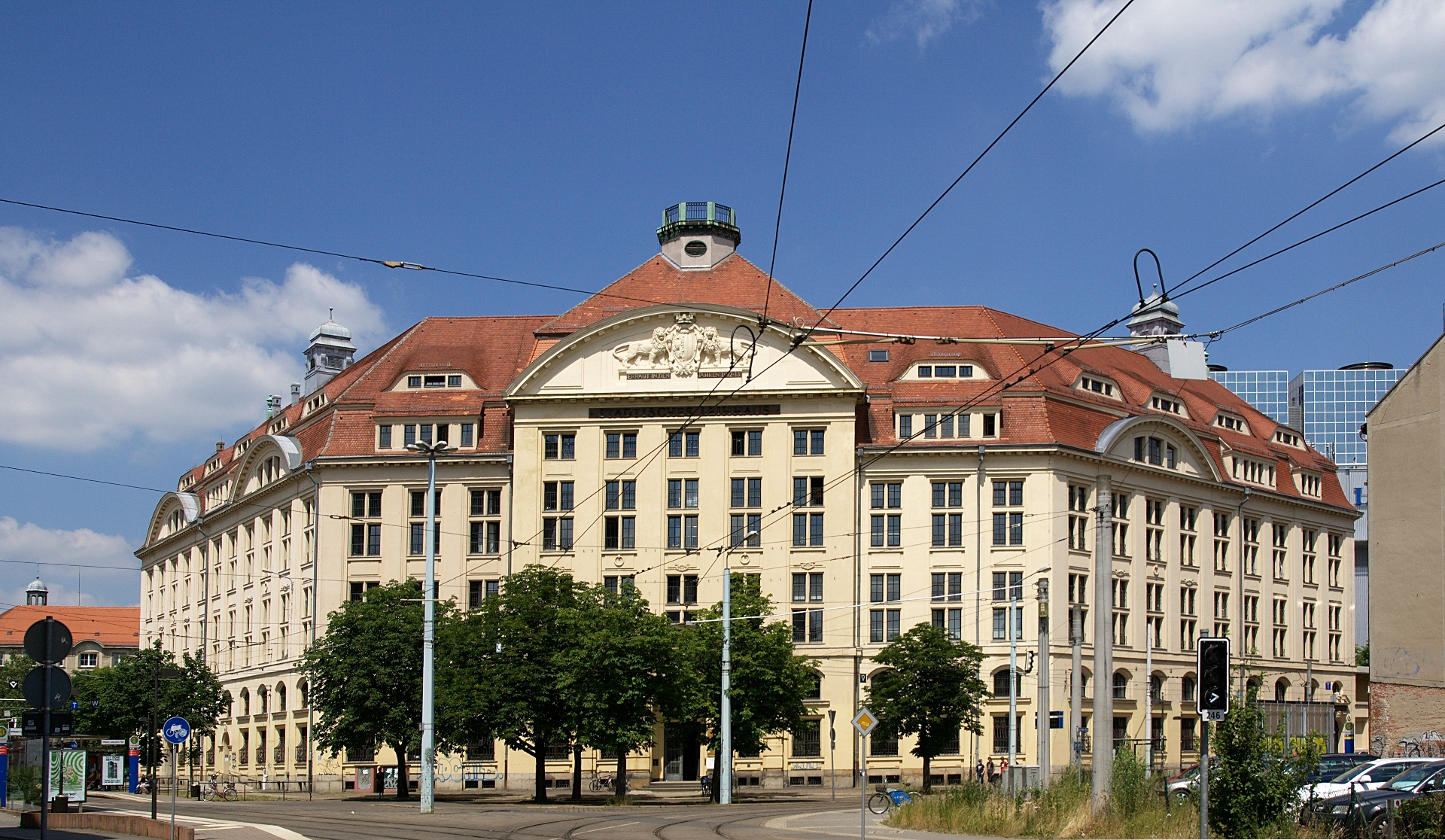 Finanzamt Leipzig I ehem. Städtisches Leihhaus am Wilhelm-Liebknecht-Platz